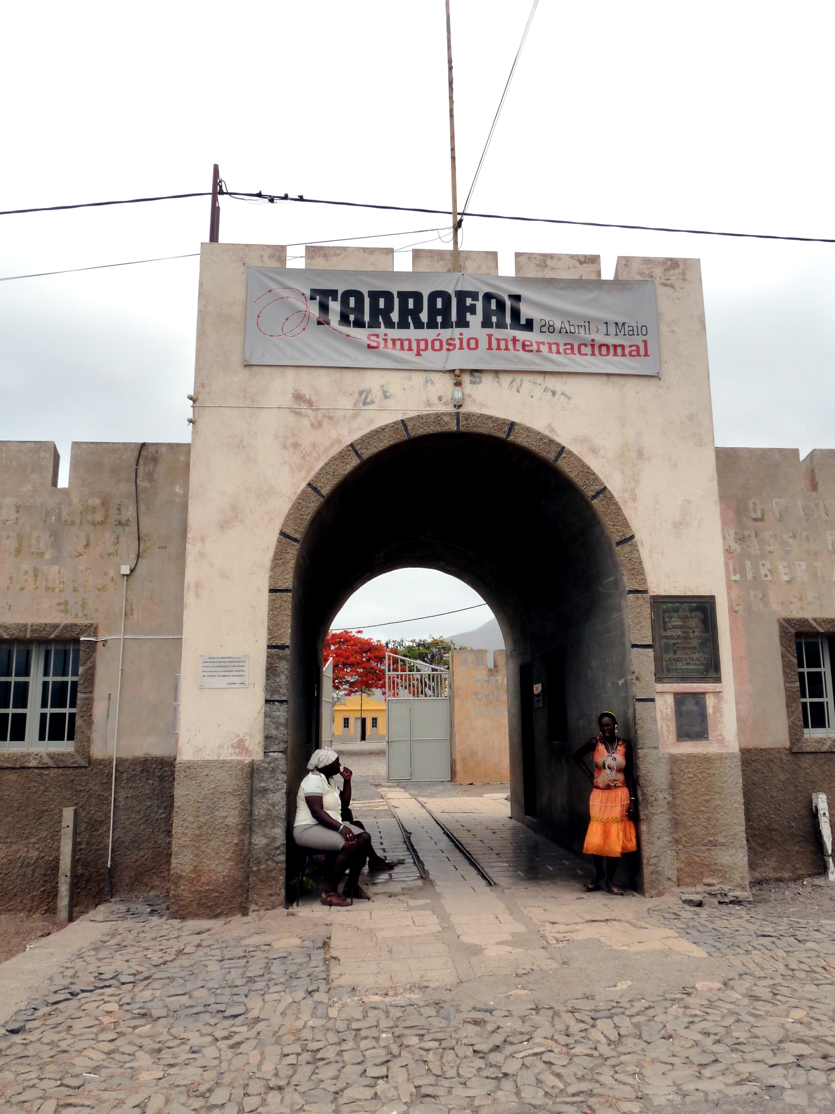 Antigo Campo de Concentração do Tarrafal, Ilha de Santiago - Cabo Verde / Old Concentration Camp in Tarrafal, Santiago Island - Cape Verde